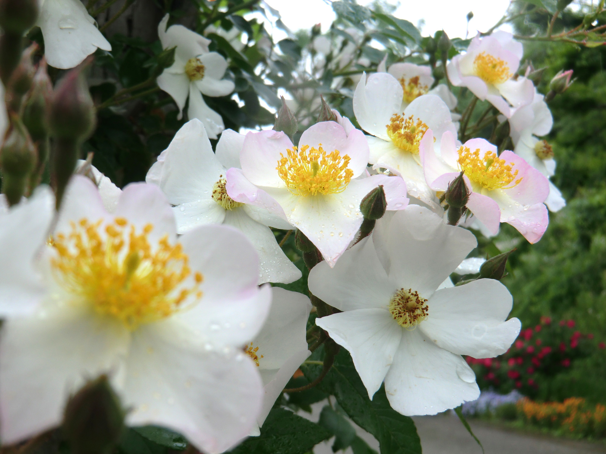 Rose Pierre Gagnaire バラ ピエール ガニェール Shrub rose シュラブ France フランス Delbard 2002